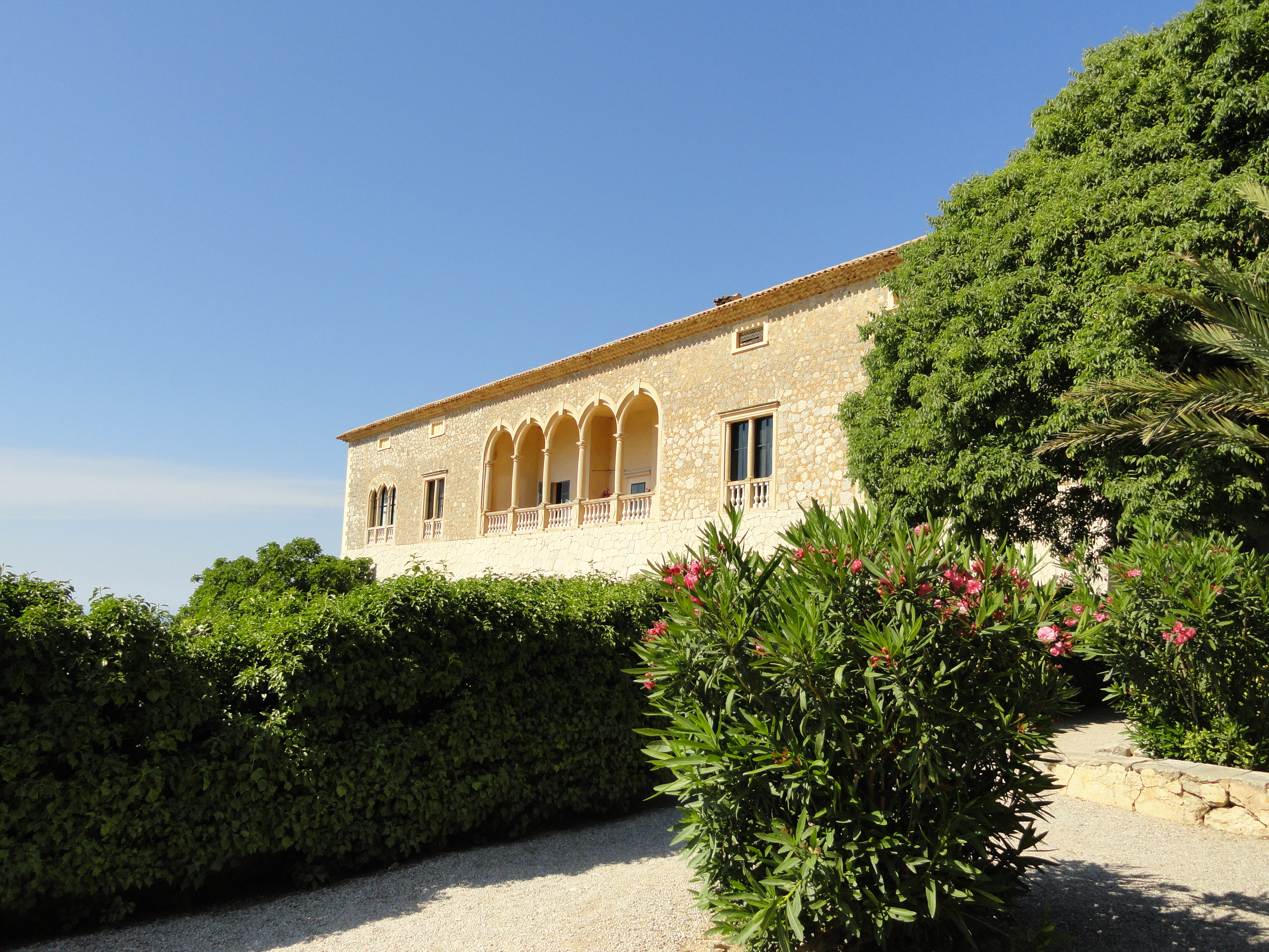 Mirada del oeste